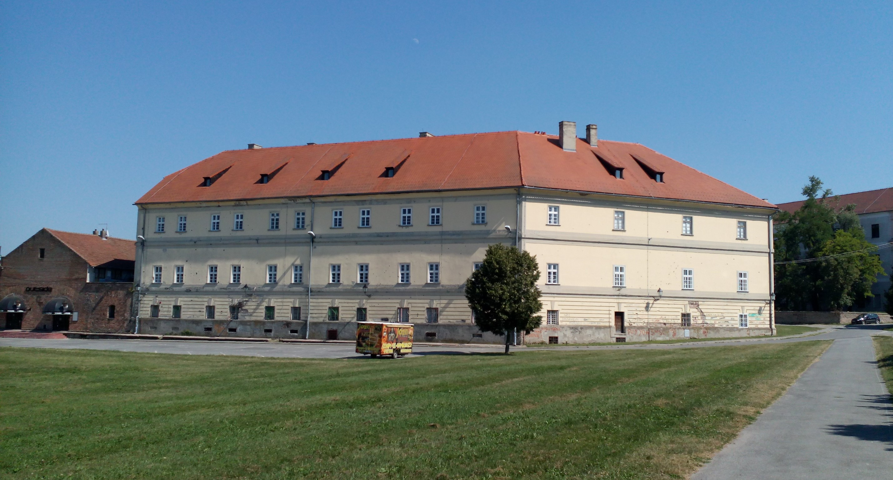 Isusovačka klasična gimnazija s pravom javnosti u Osijeku.